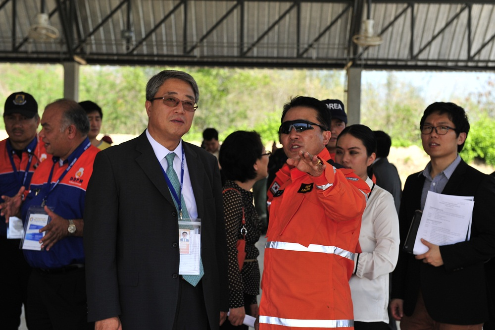 전재만, 방장원, THE ASEAN REGIONAL FORUM DISASTER RELIEF EXERCISE (ARF DiREx) 2013, CHA-AM, THAILAND, 7-11 MAY 2013